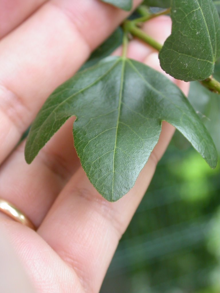 Feuille d'Acer sempervirens - érable de Crête